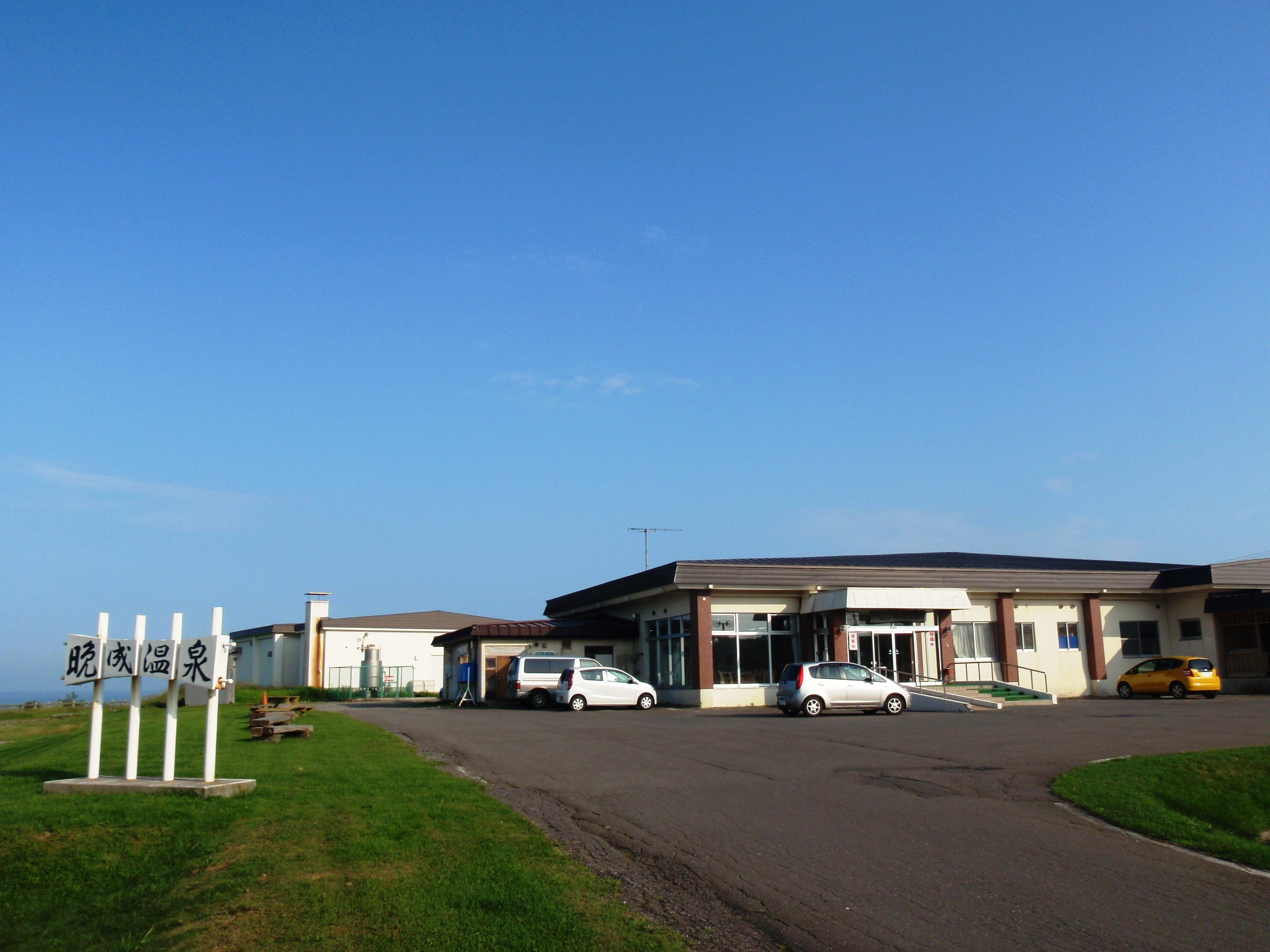 晩成温泉外観